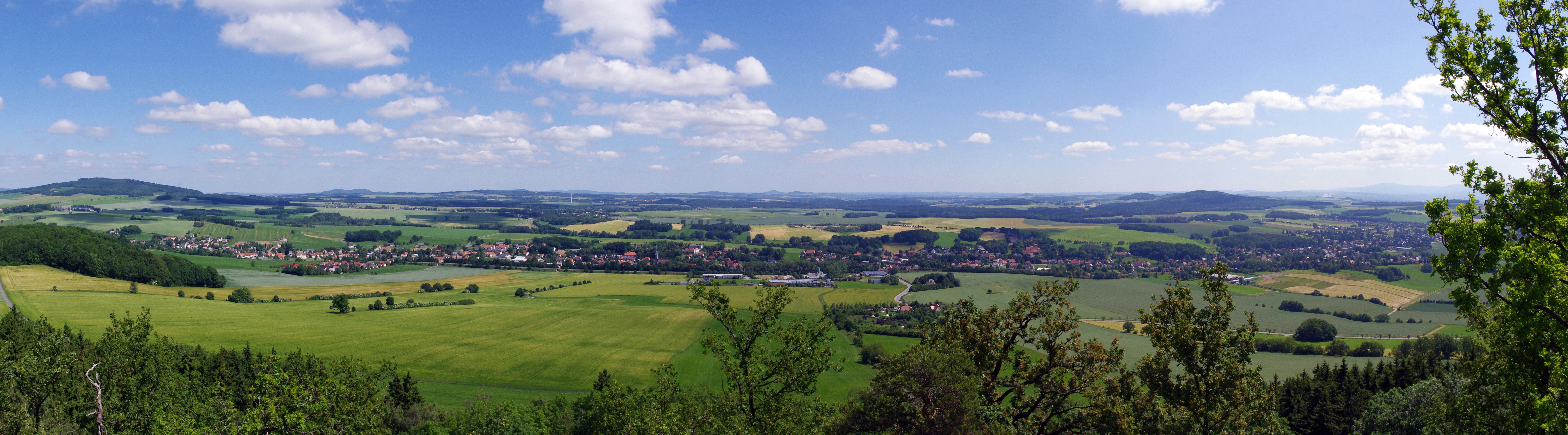 Panorama von Oderwitz, links Oberoderwitz, rechts Niederoderwitz, vom Spitzberg.